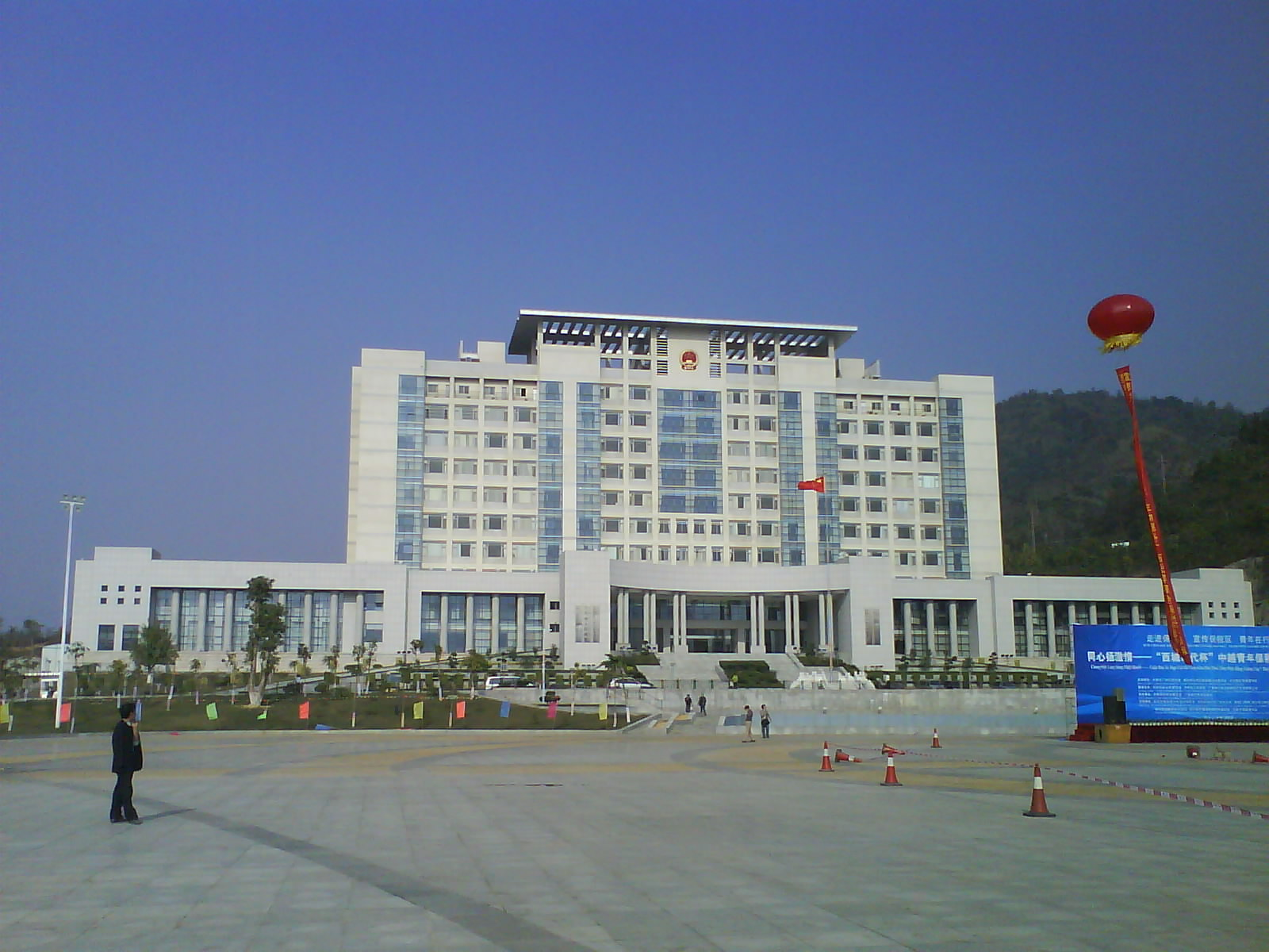 广西凭祥新政府大楼